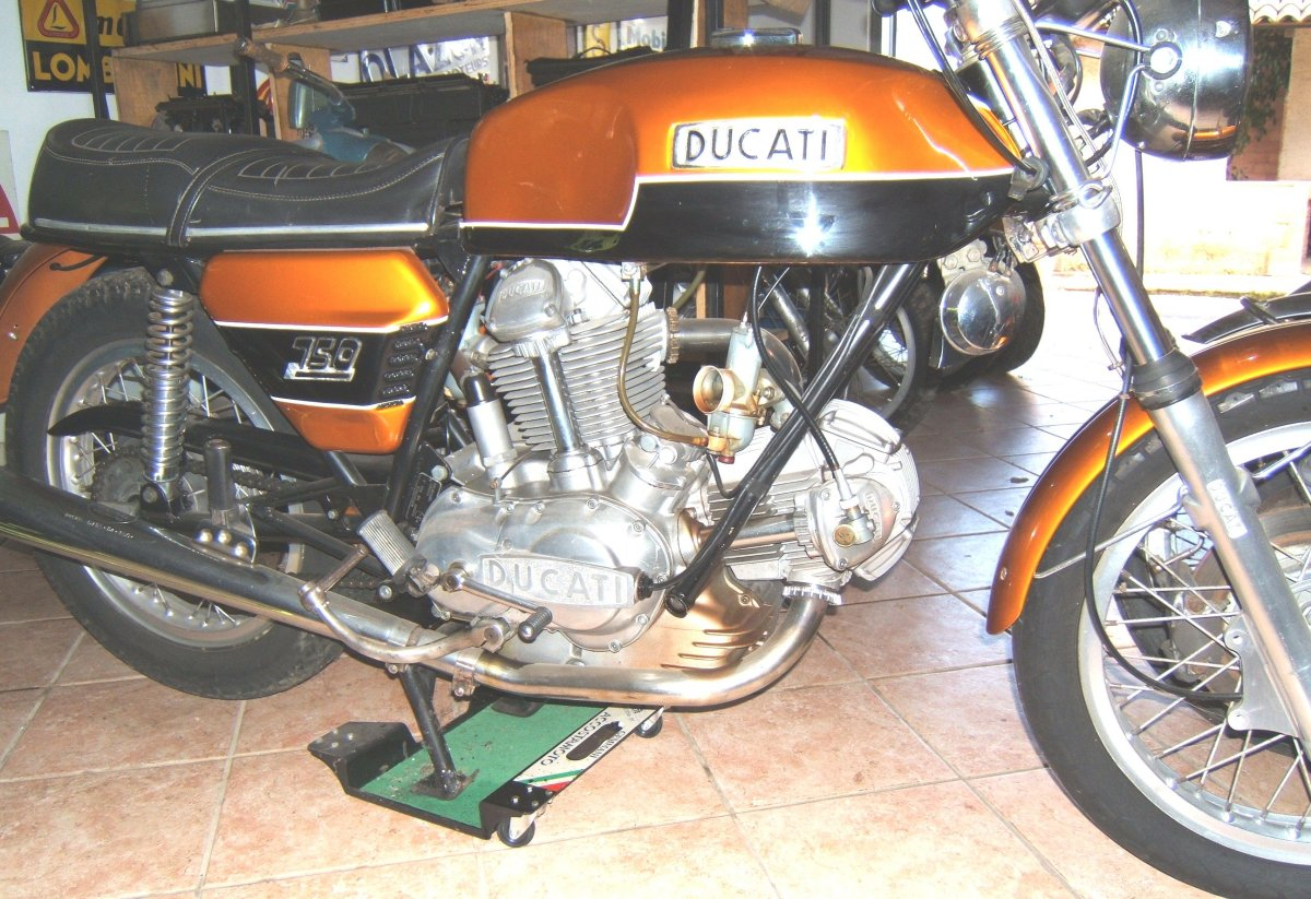 Ducati 750 GT 1974